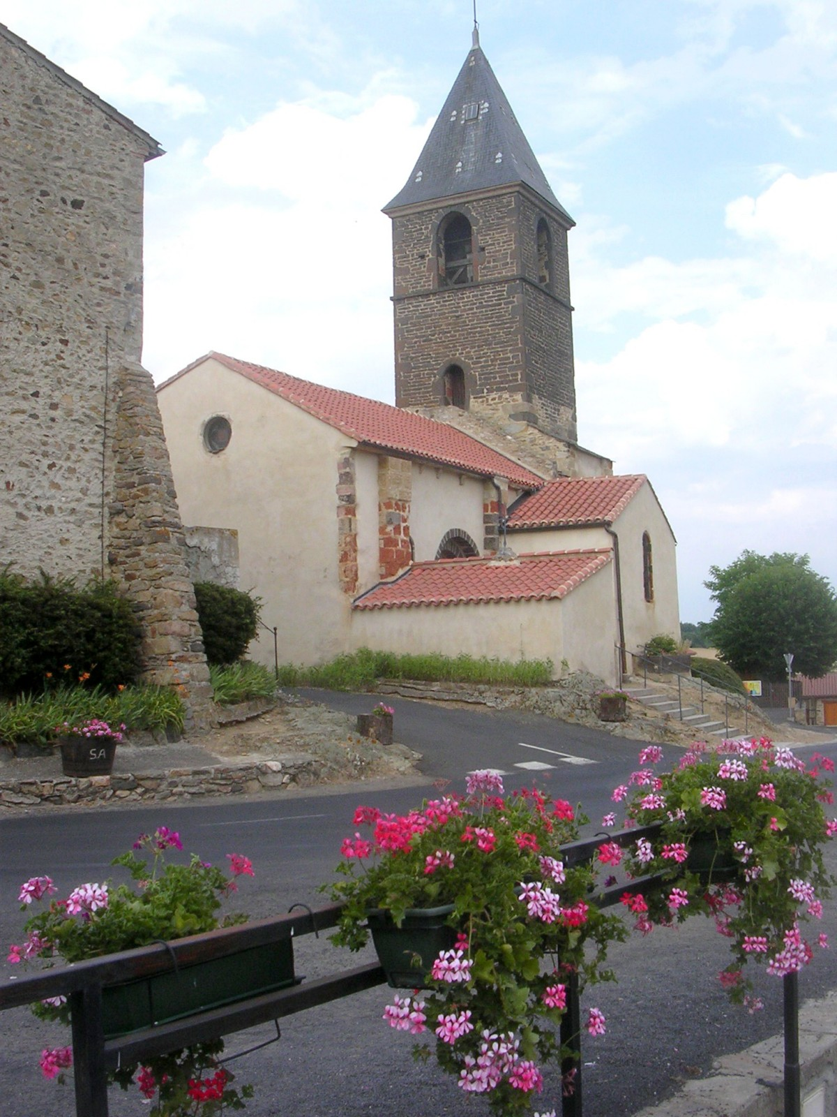 Église d'Esaplem (Haute-Loire) France